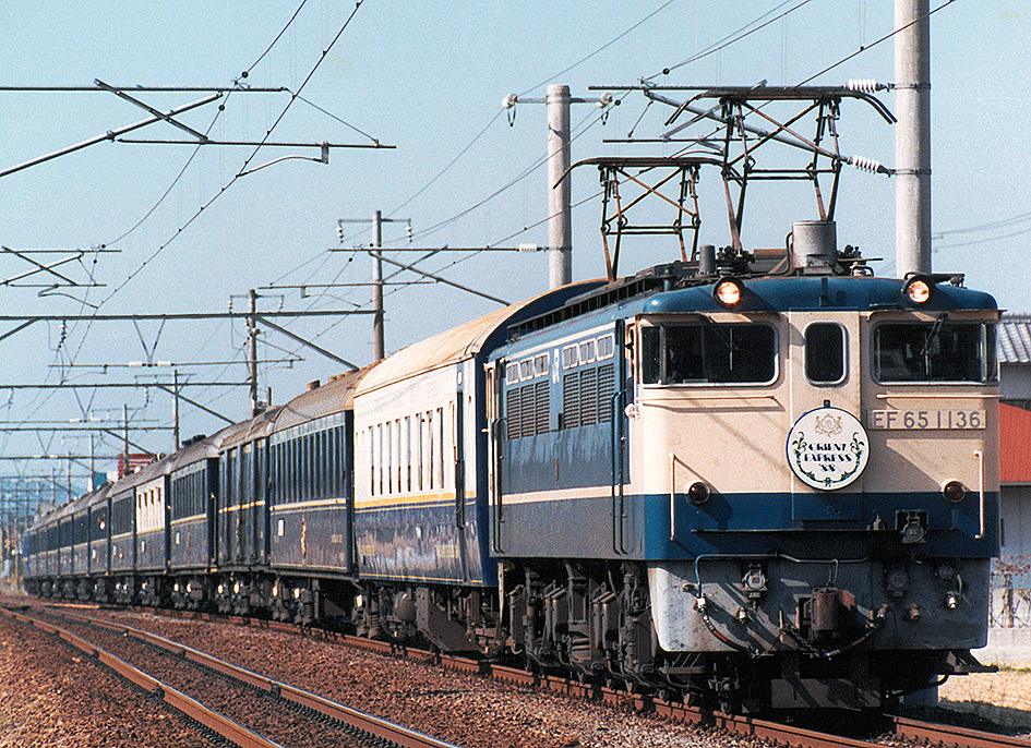 EF65 1136牽引 オリエントエクスプレス’88